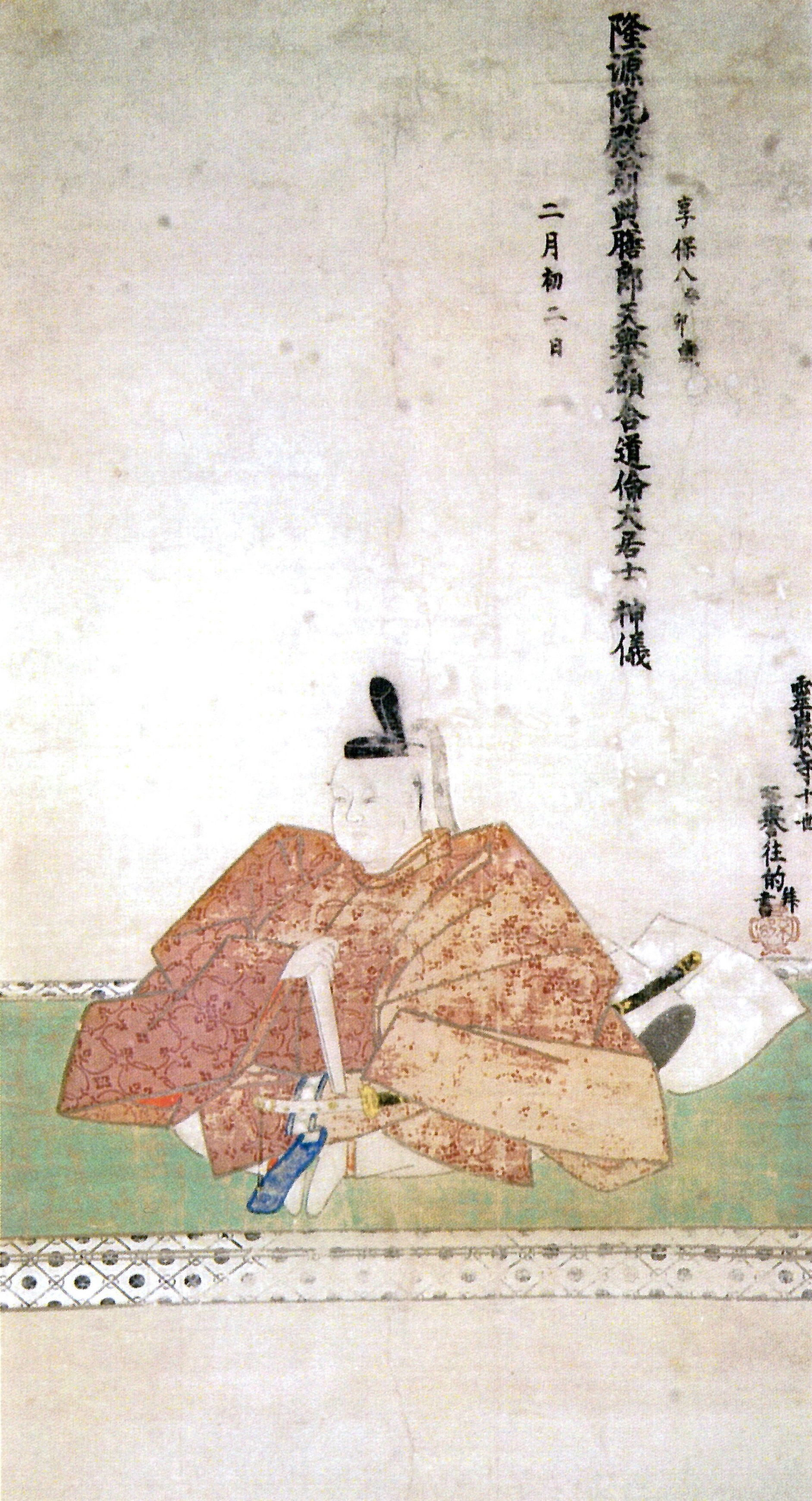 京極高之の肖像。